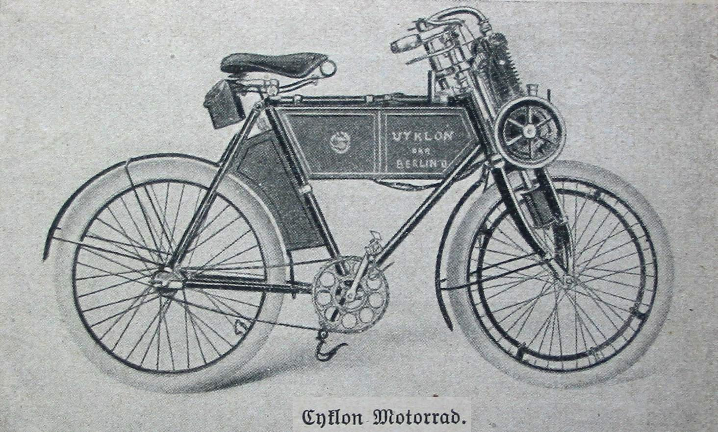 Motorrad um 1900 Bild von vor 1906, PD-alt